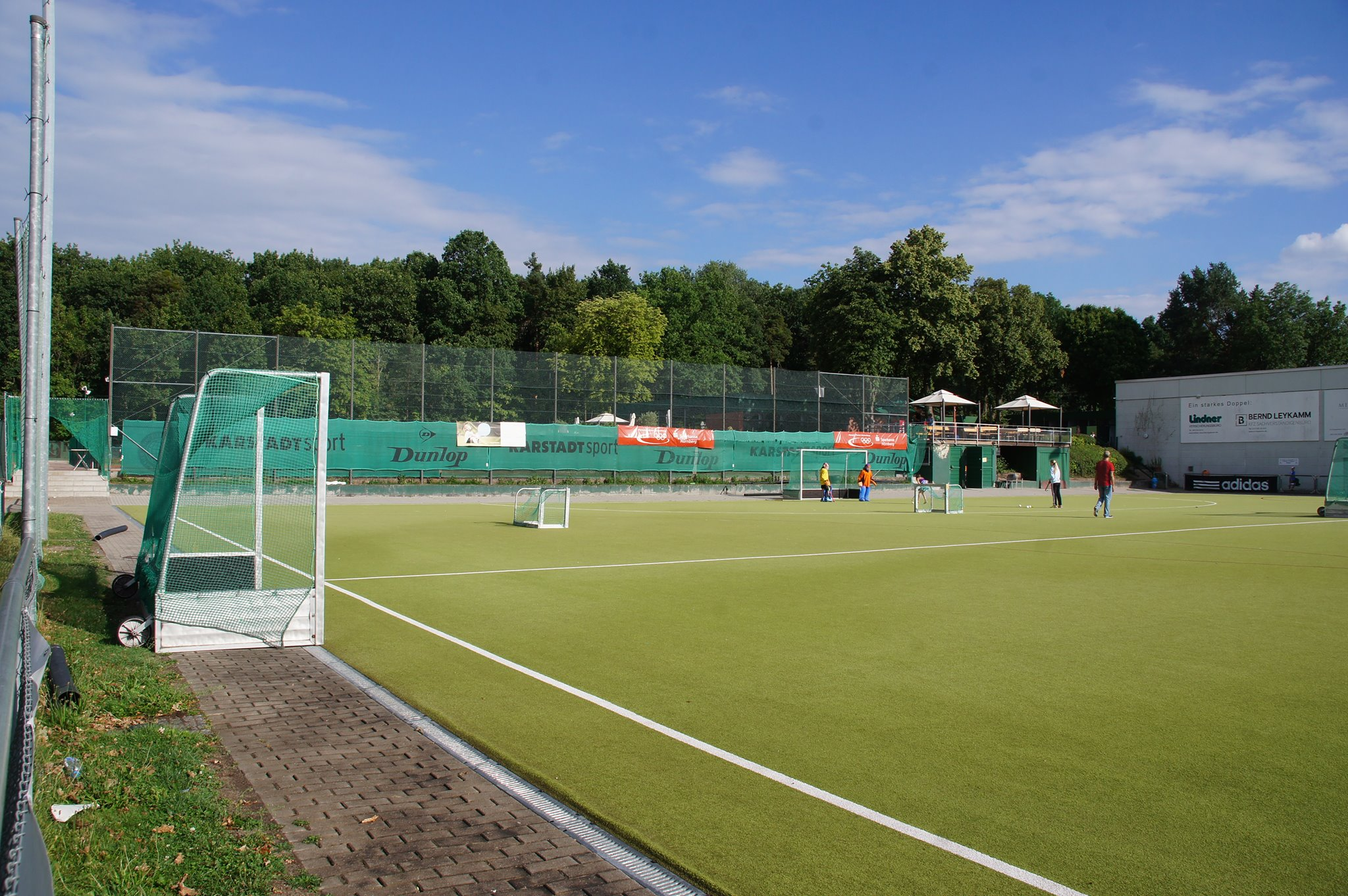 NHTC, Nürnberger HTC, Hockey Platz 1